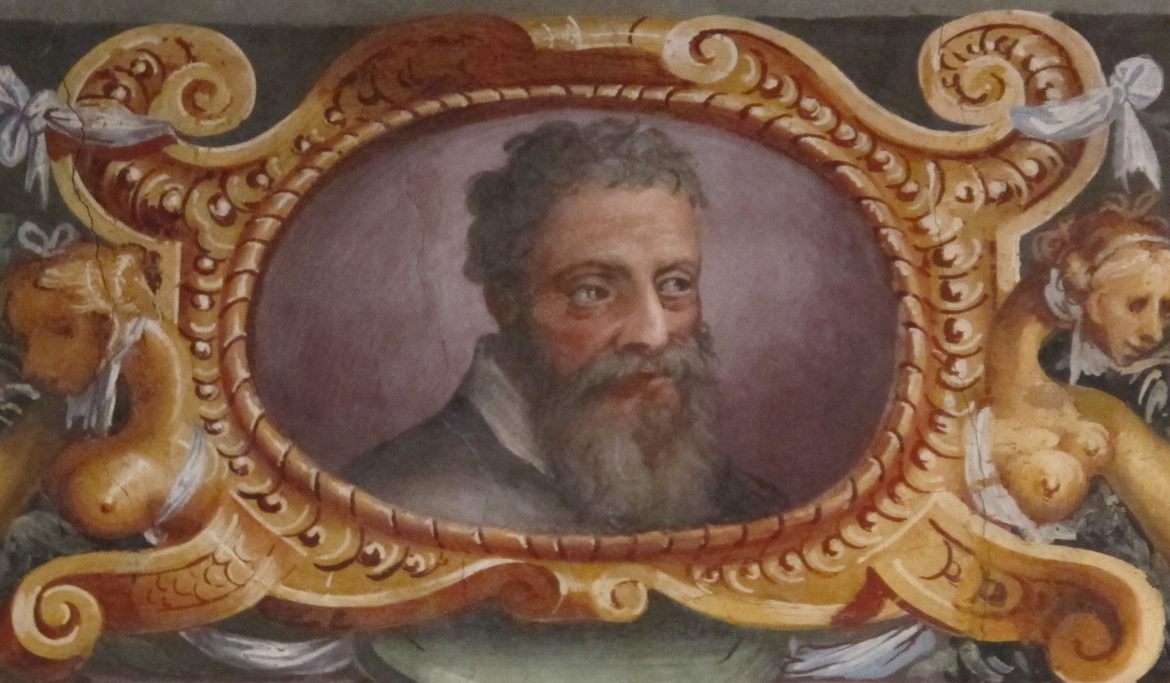 Casa vasari FI, salone, ritratti a, perin del vaga